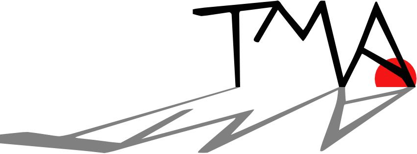 Tijdschrift voor Mediterrane Archeologie